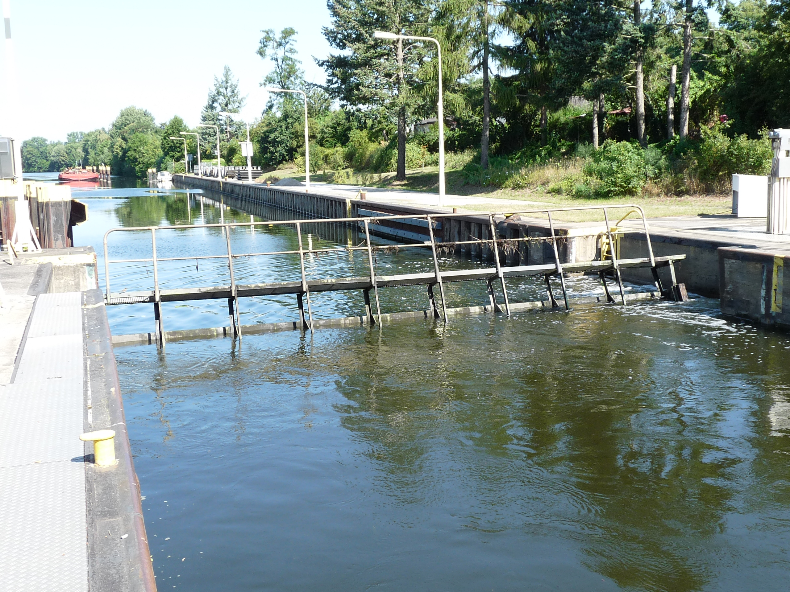 Die Schleuse Plötzensee ist eine Schiffsschleuse am Kilometer 7,45 des Berlin-Spandauer Schifffahrtskanals im Ortsteil Charlottenburg-Nord des Berliner Bezirks Charlottenburg-Wilmersdorf in Deutschland.